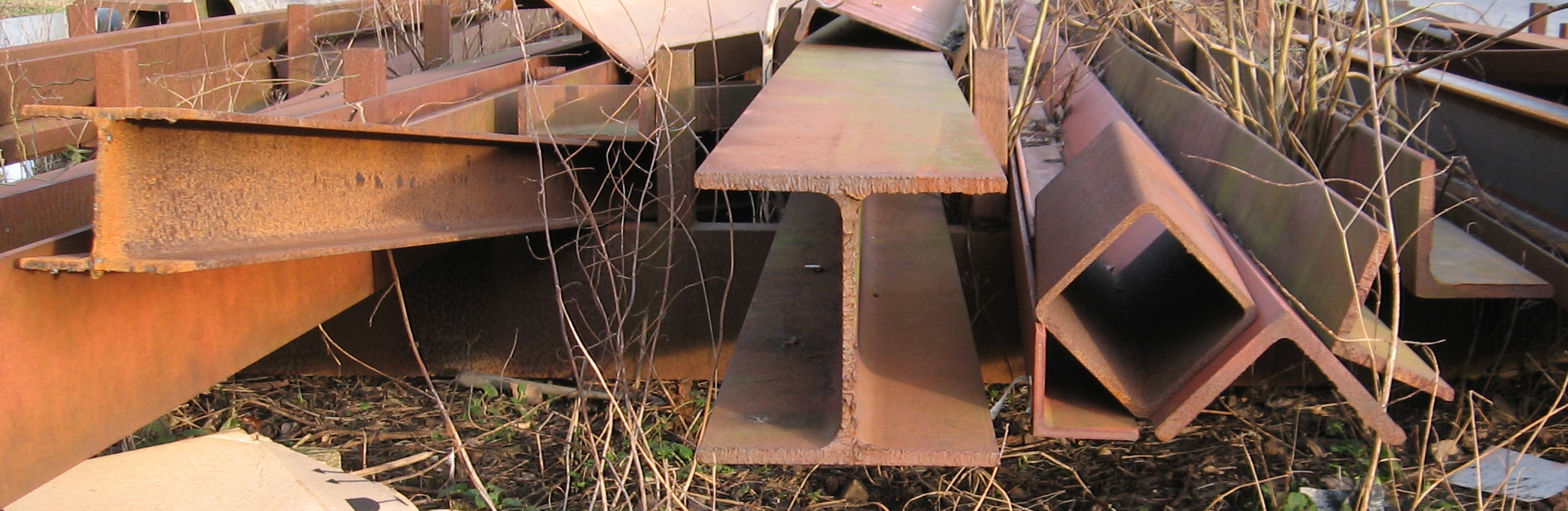 Stålprofiler